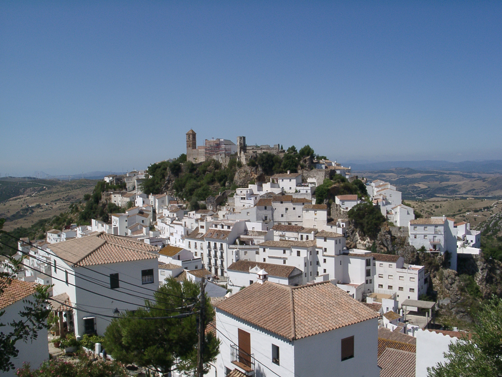 Casares (Málaga)